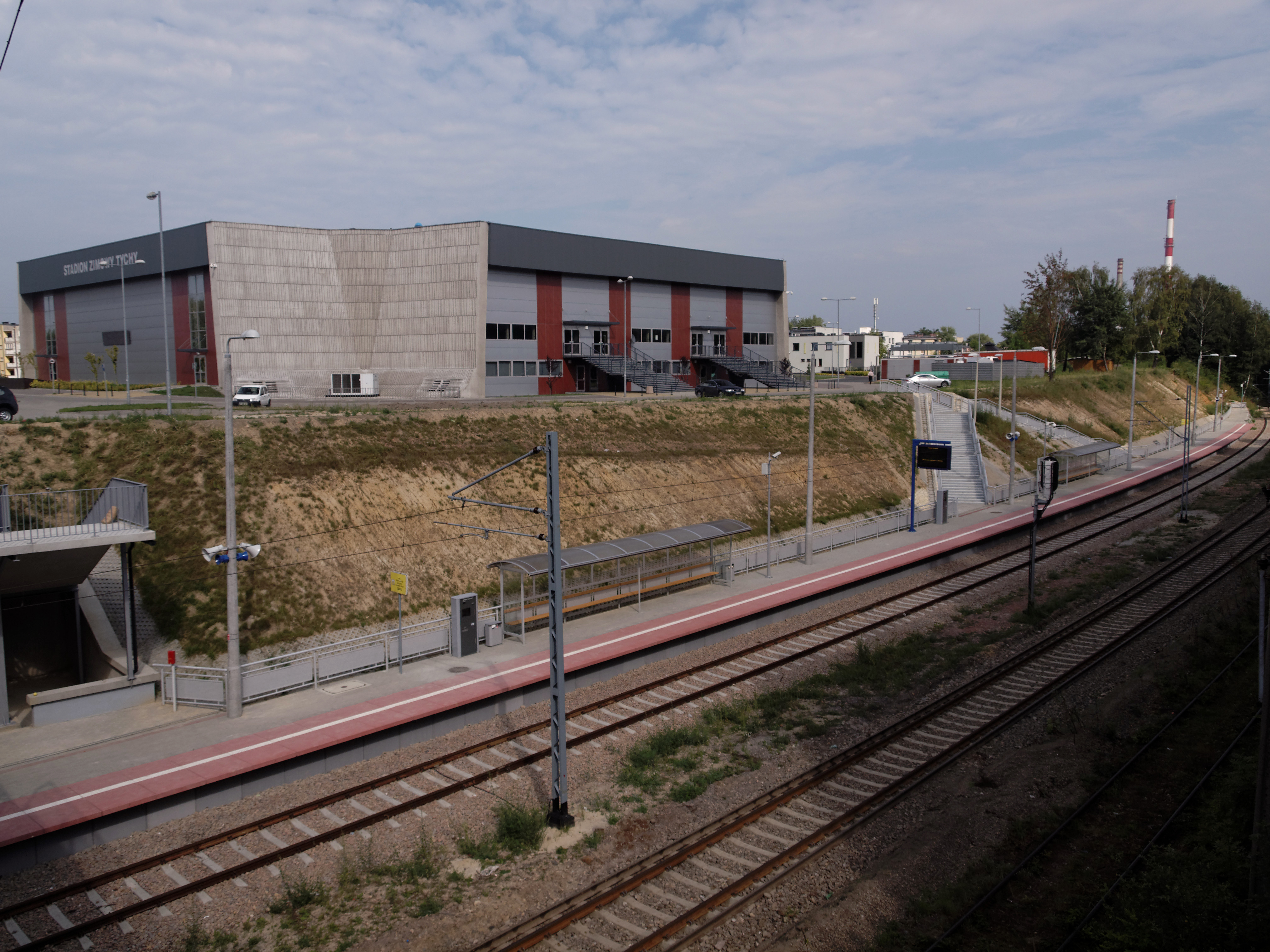 Stacja kolejowa Tychy Lodowisko